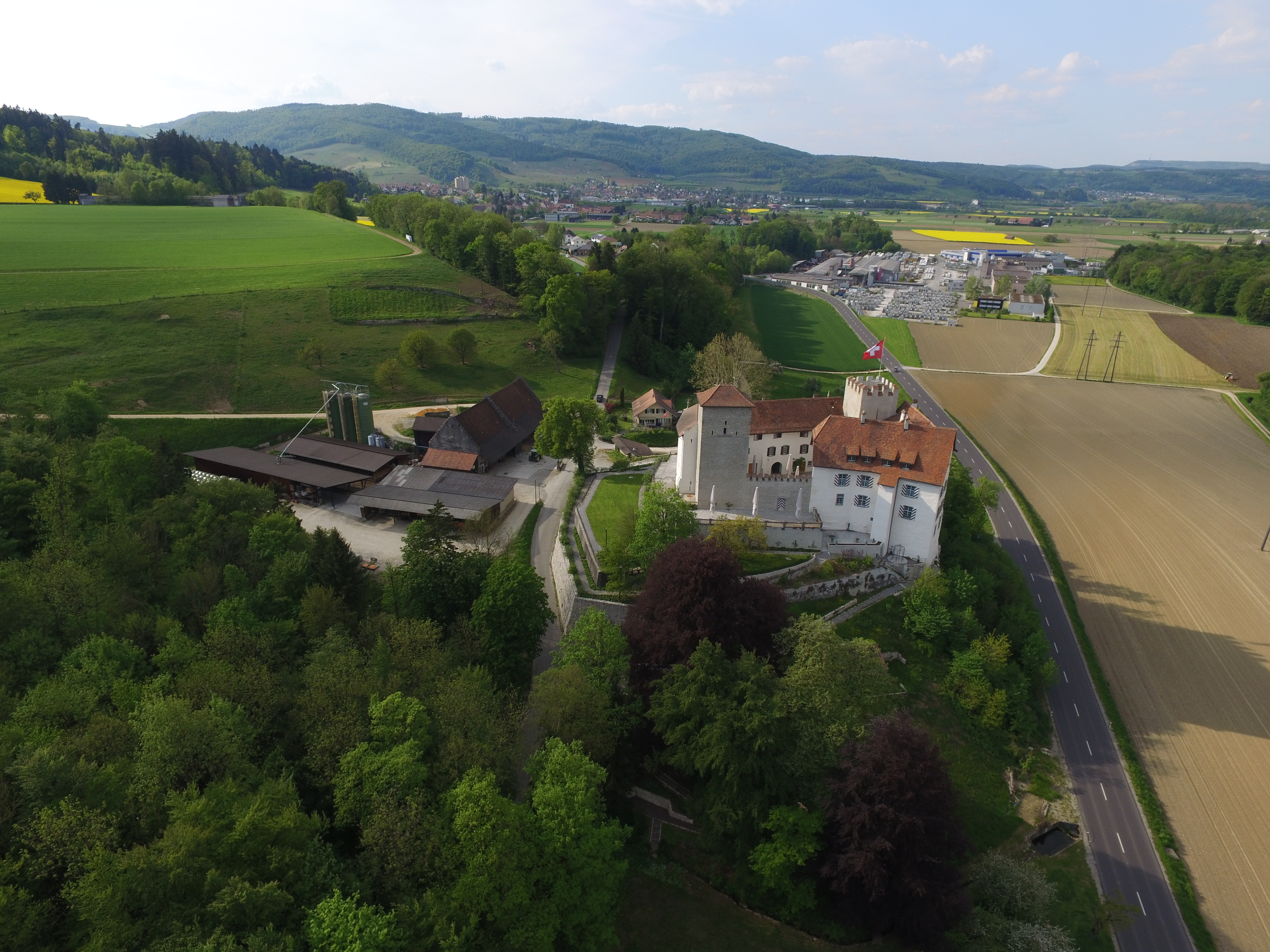 Jurapark Aargau, Schloss Wildenstein (Veltheim)